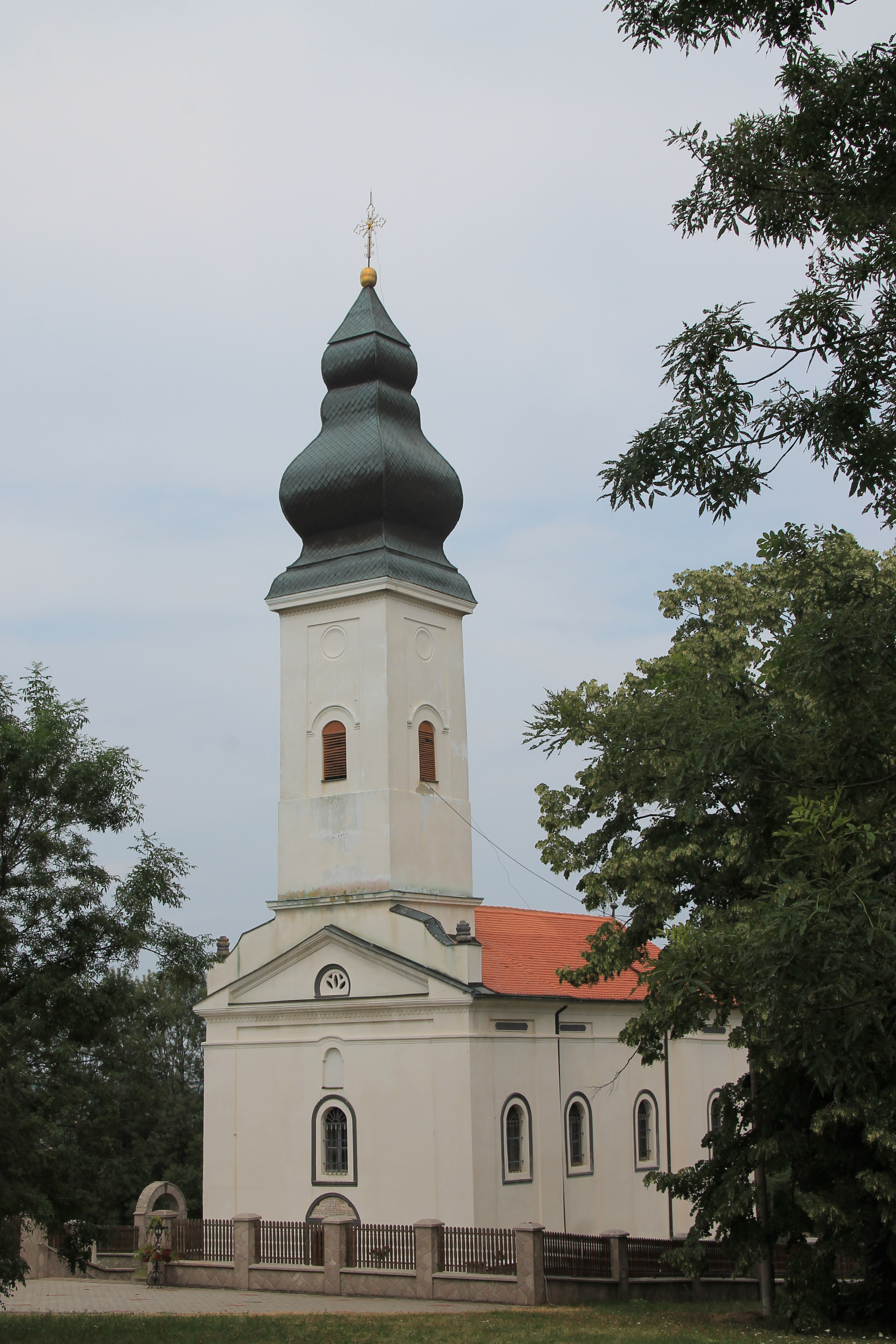 Crkva Sv. Petra i Pavla (Čumić)